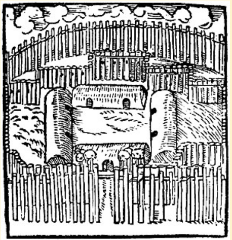 Aldeia indígena com um sistema de paliçadas para defesa.